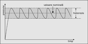 Grafic tipic al histerezisului. Presiunea este menținută în jurul valorii nominale.